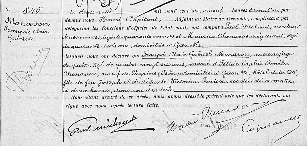 Acte de décès du poète grenoblois Gabriel Monavon.